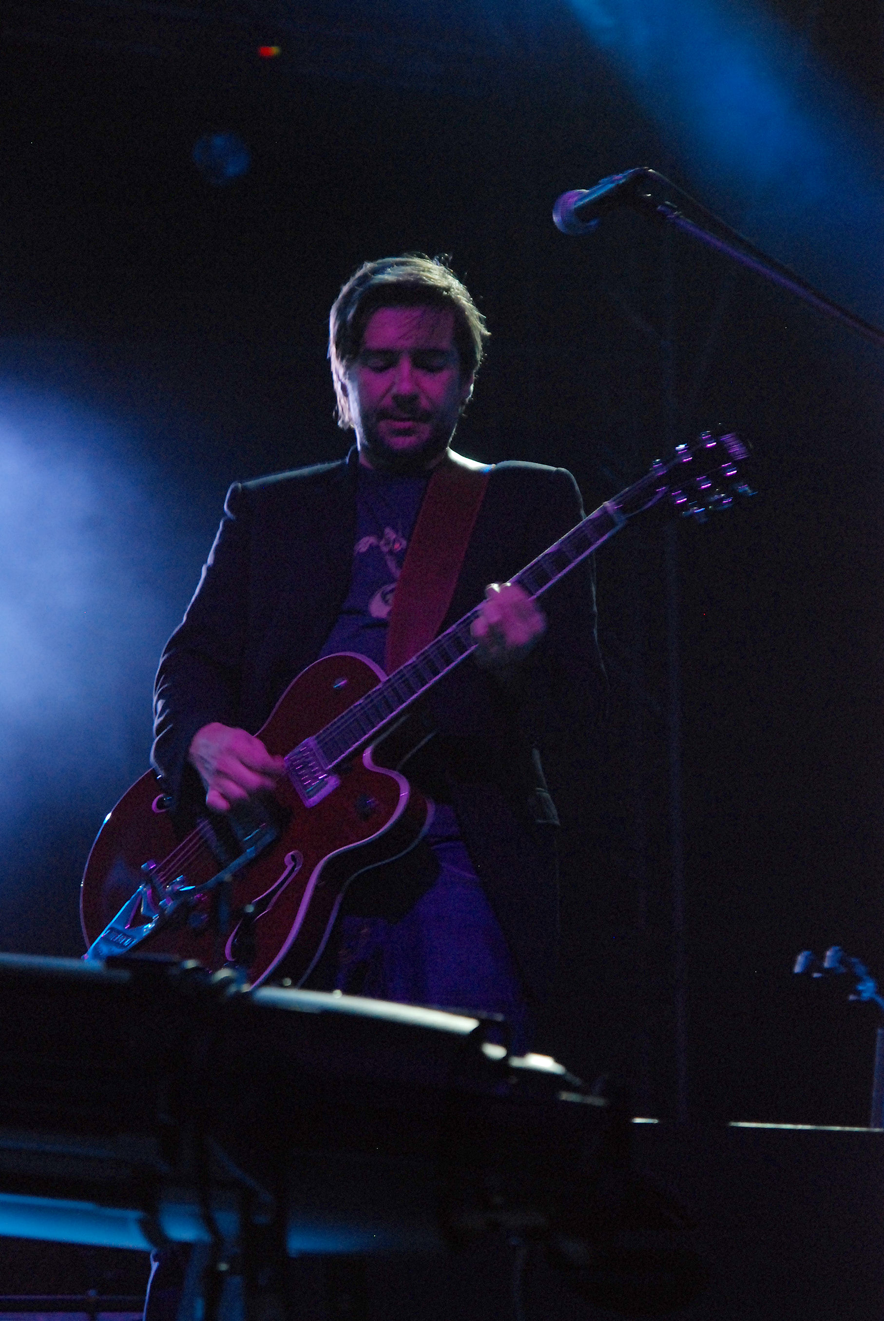 Hey podczas Maj Music Festival 2009 w Katowicach (Muchowiec)